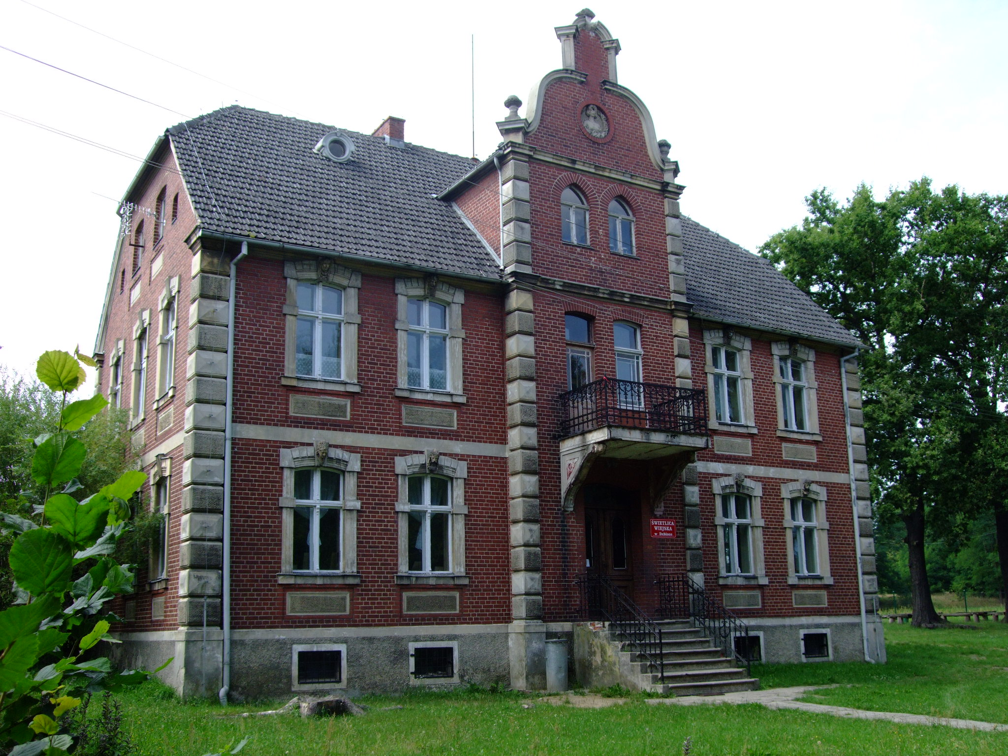 Świetlica wiejska w Dębince.